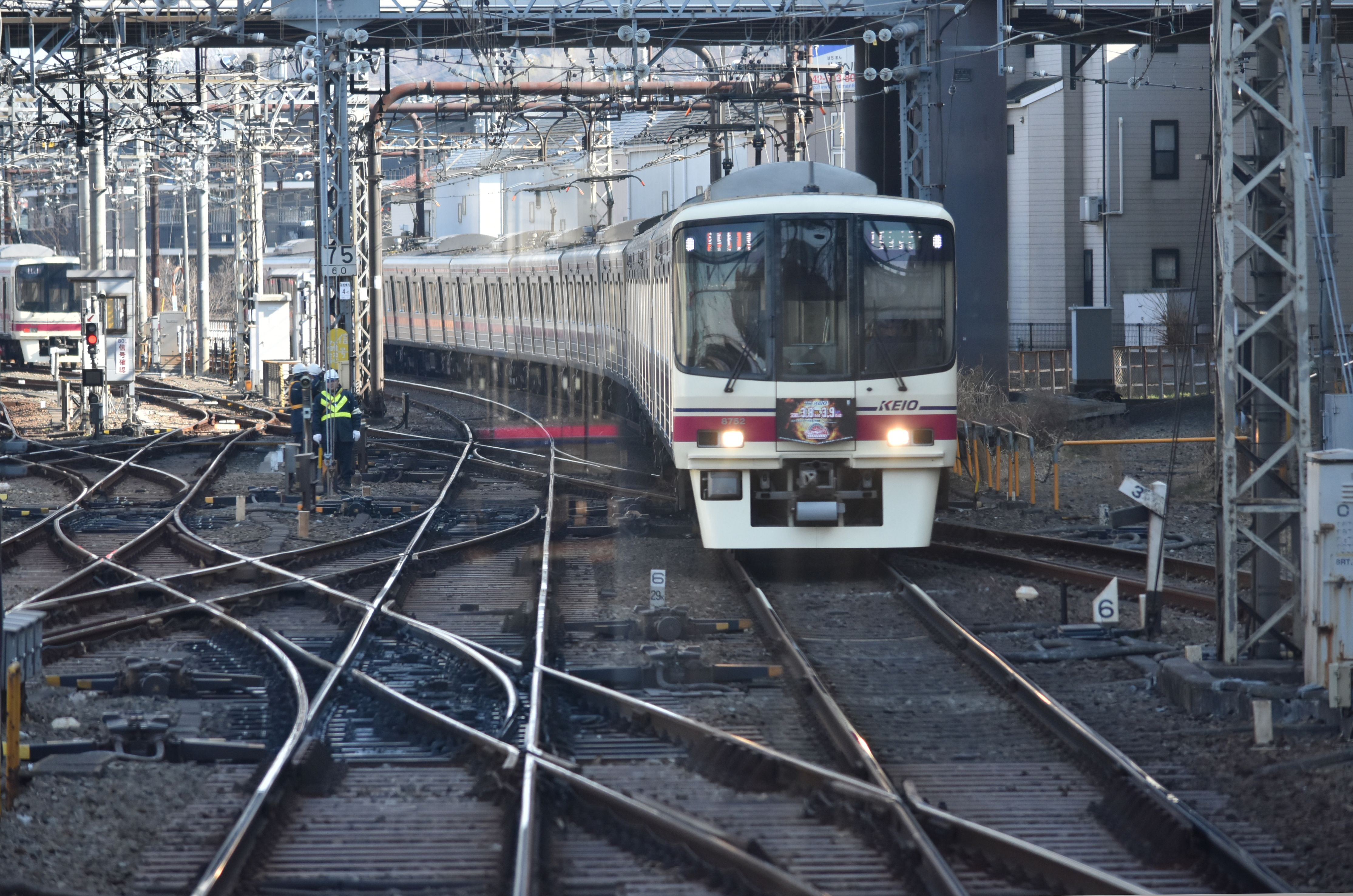 京王線 高幡不動駅 Nikon D3400